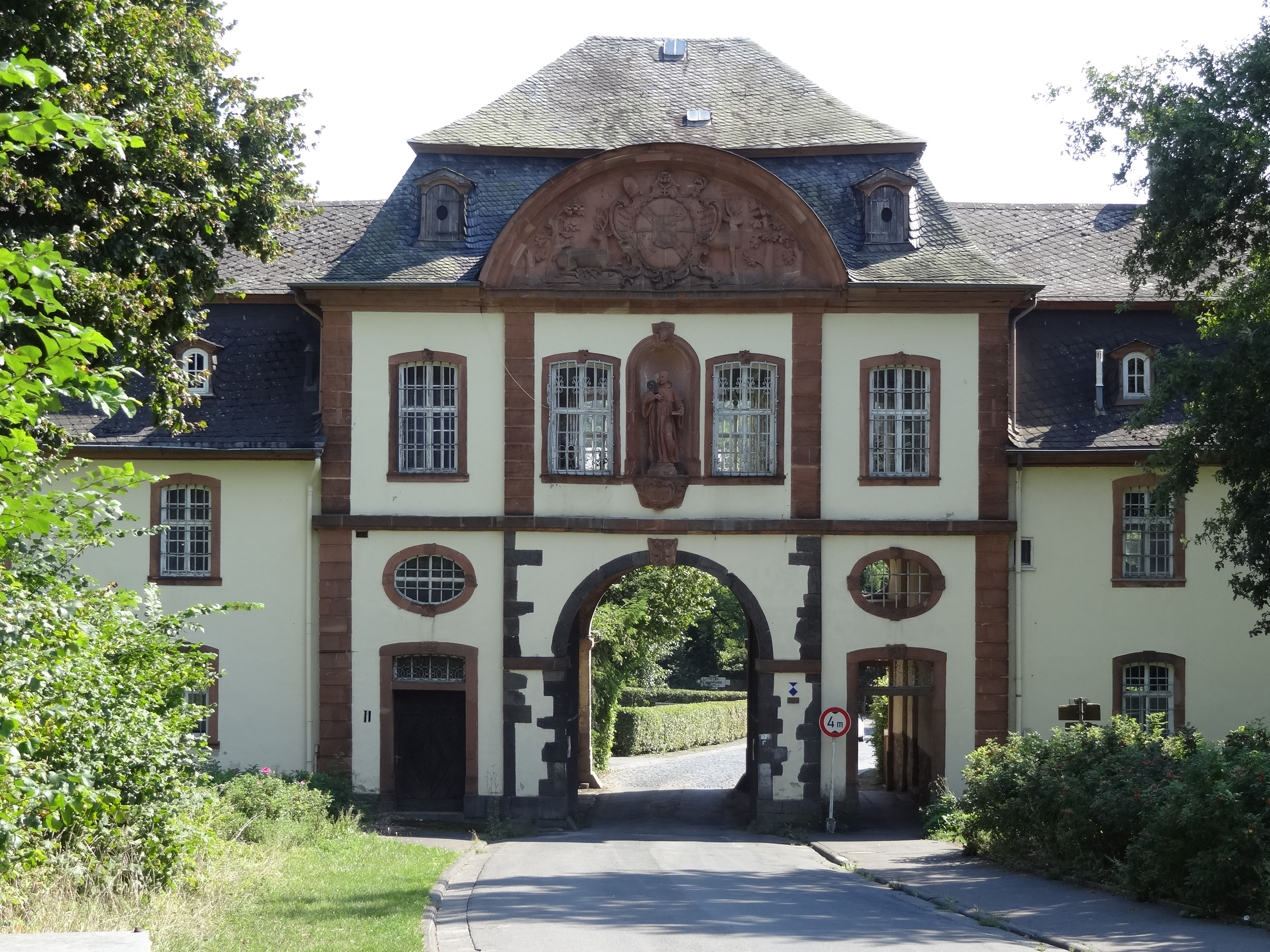 Kloster Arnsburg (Pforte)